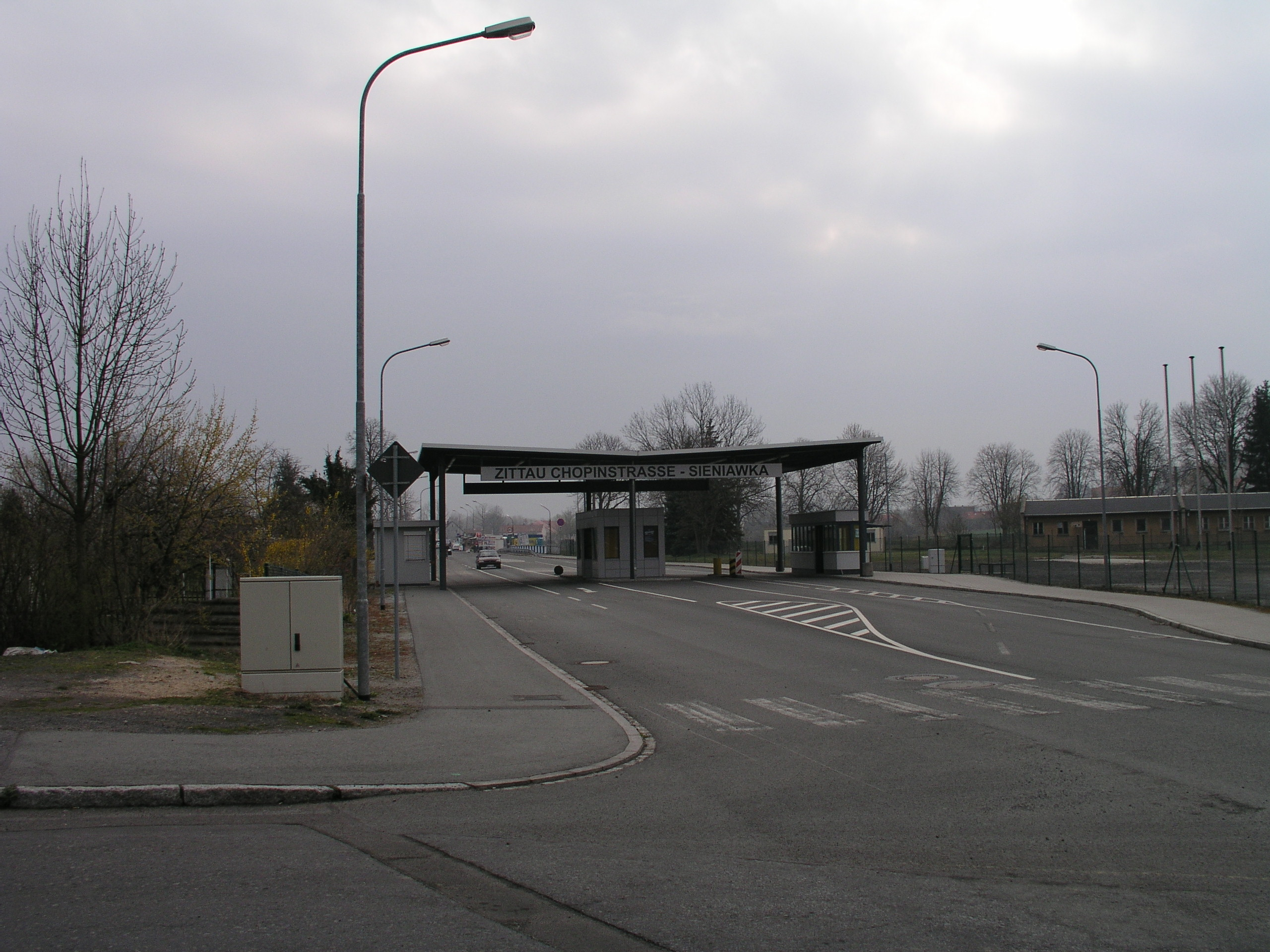 Bordercrossing D-PL Zittau Chopinstrasse-Sieniawka